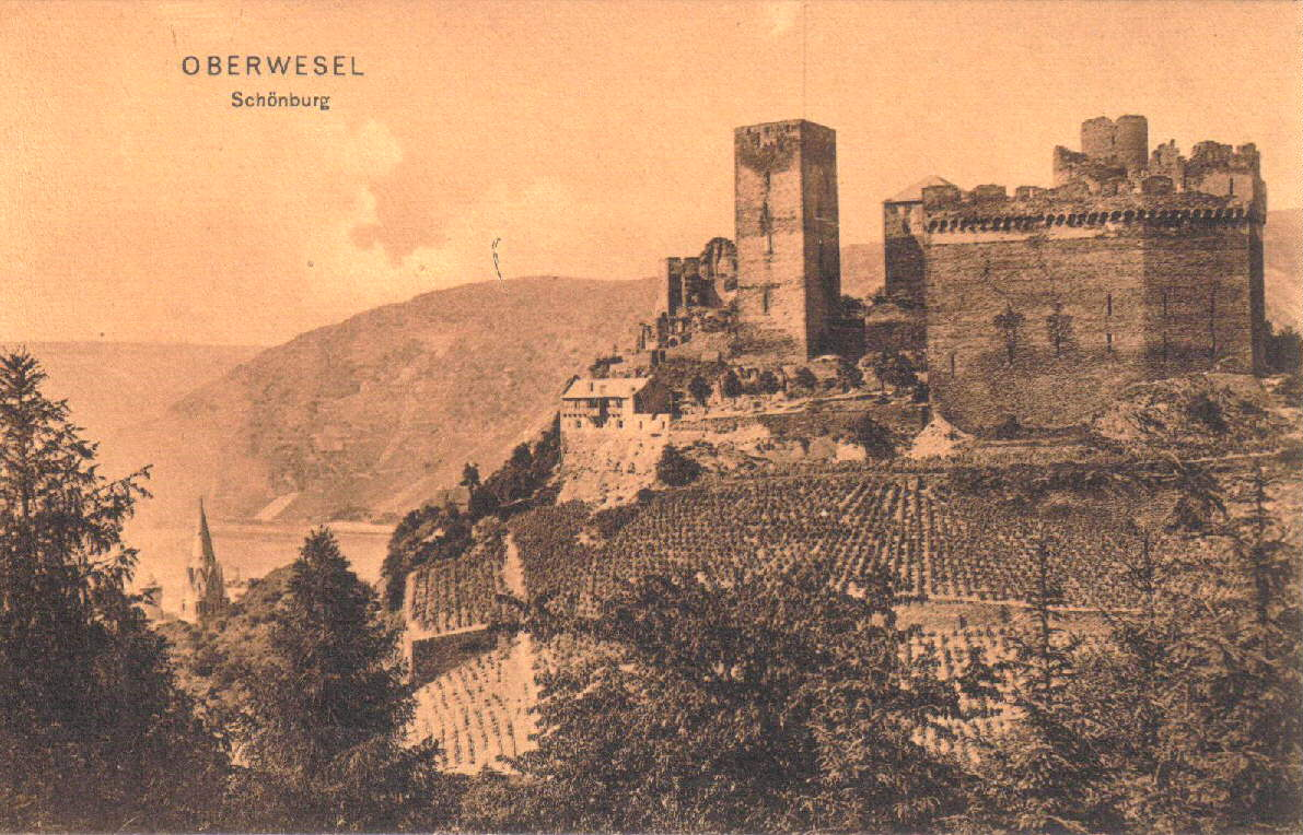 Schloss Schönburg bei Oberwesel, 1907